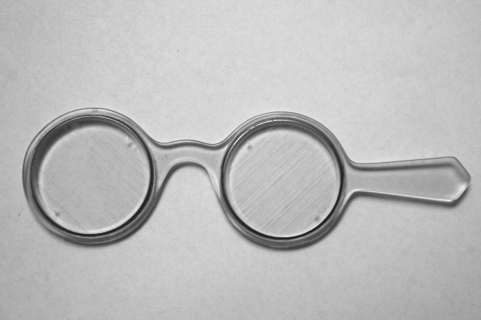 Lichtschweifglas nach Bagolini